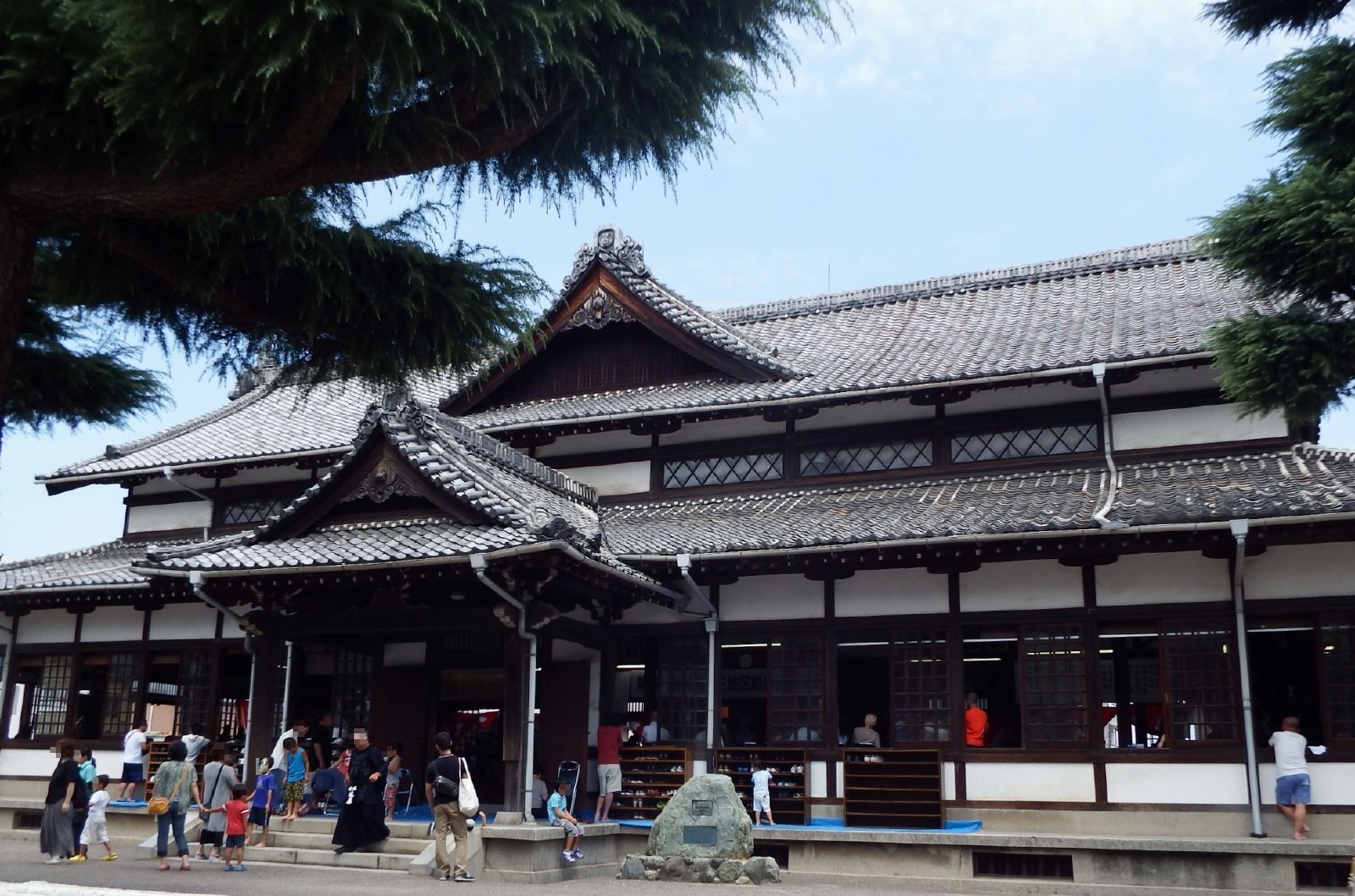 新居浜市の武徳殿